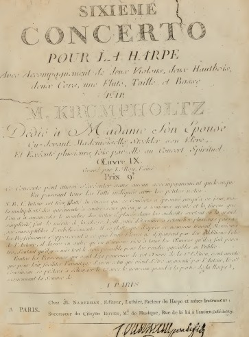 Premiera pagina de l'edicion de Jean-Henri naderman deu cocnerto per arpa en Fa Major de Joan-Batista Krumpholtz, ambé lo ritornello dei Filhetas de Tolon